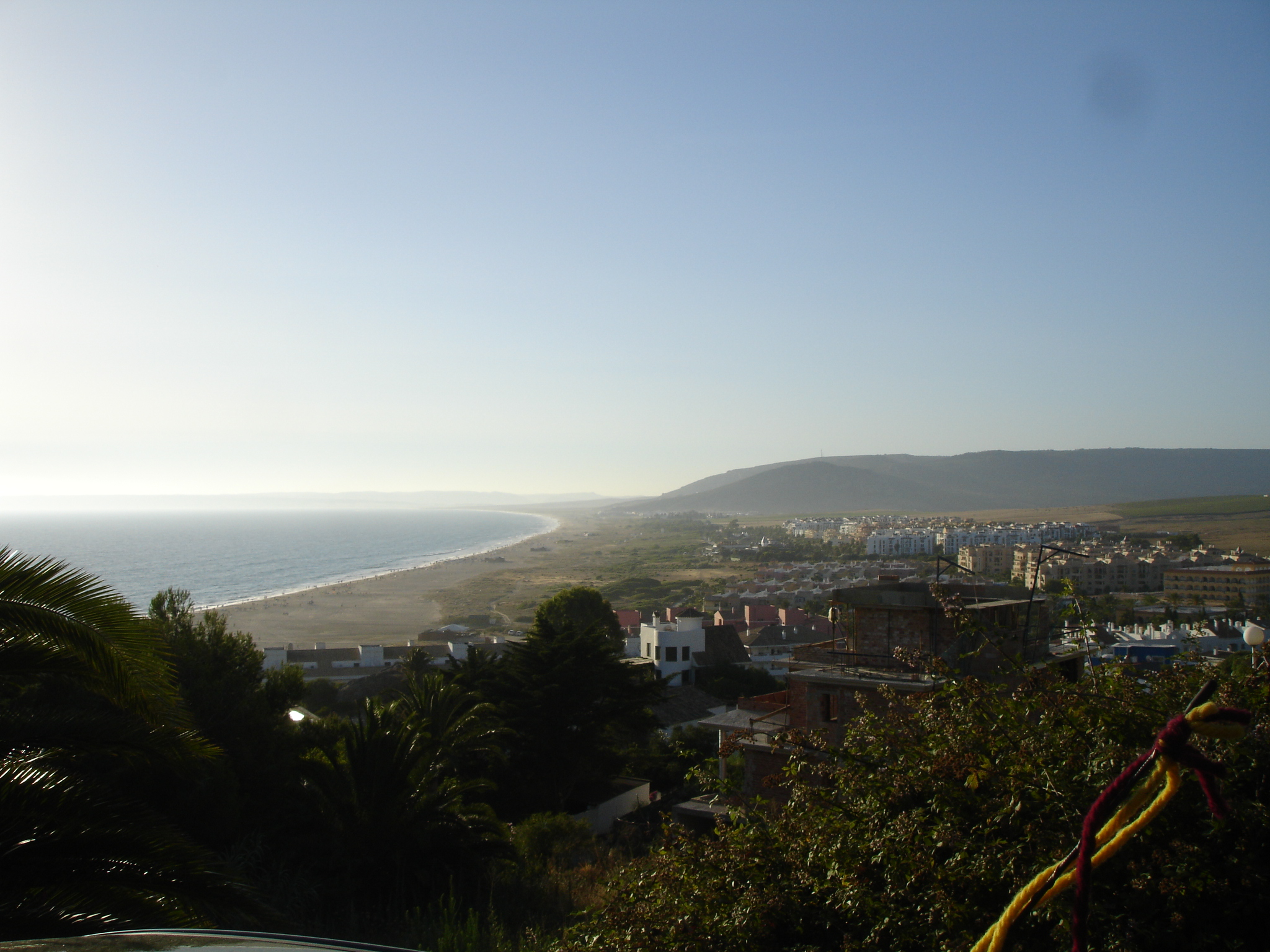 Atlanterra. Tarifa (Andalusia, Spain)